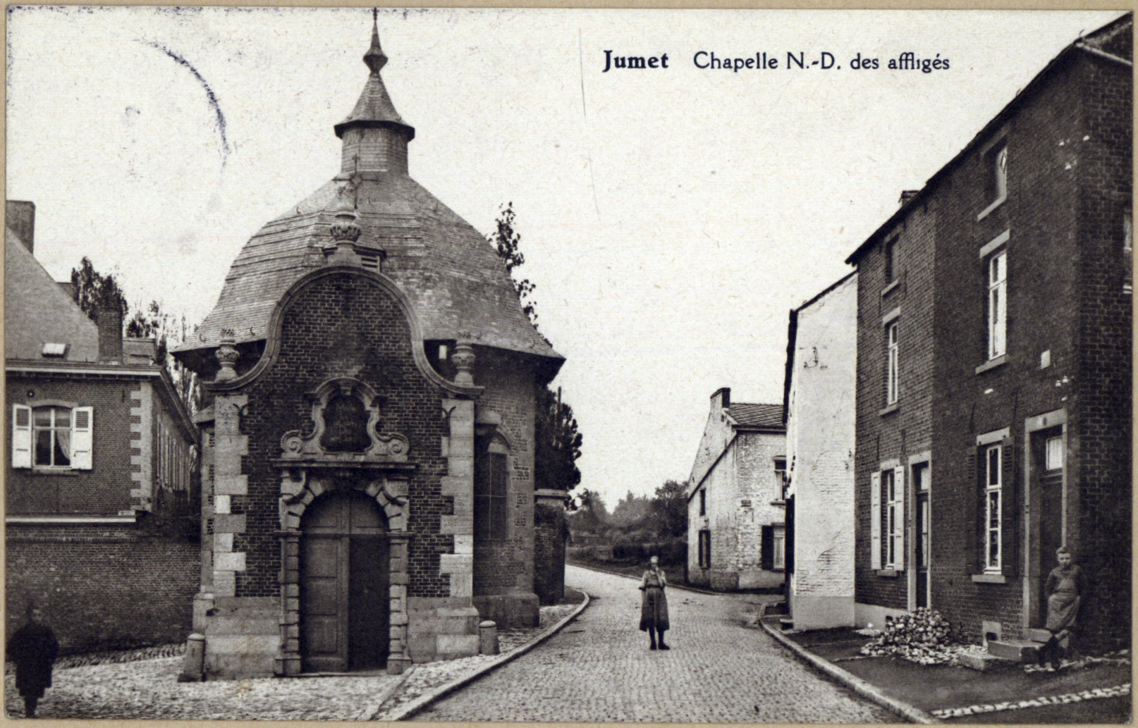 Jumet (Charleroi - Belgique) - Chapelle Notre-Dame des Affligés (XVIIe - XVIIIe siècle) - photo de vers 1900